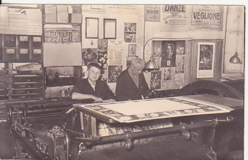 tipografia anni 50